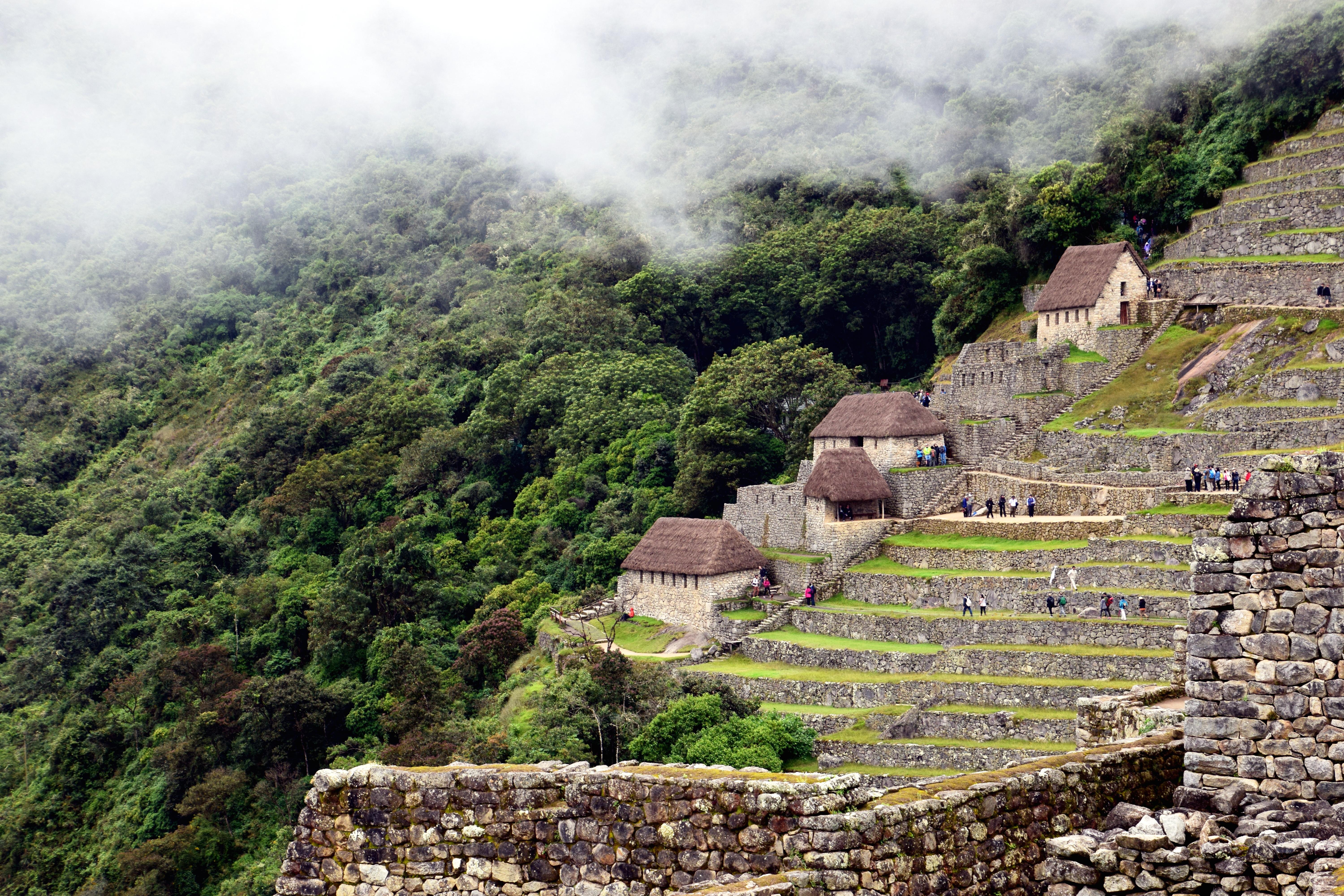 Machu Picchu